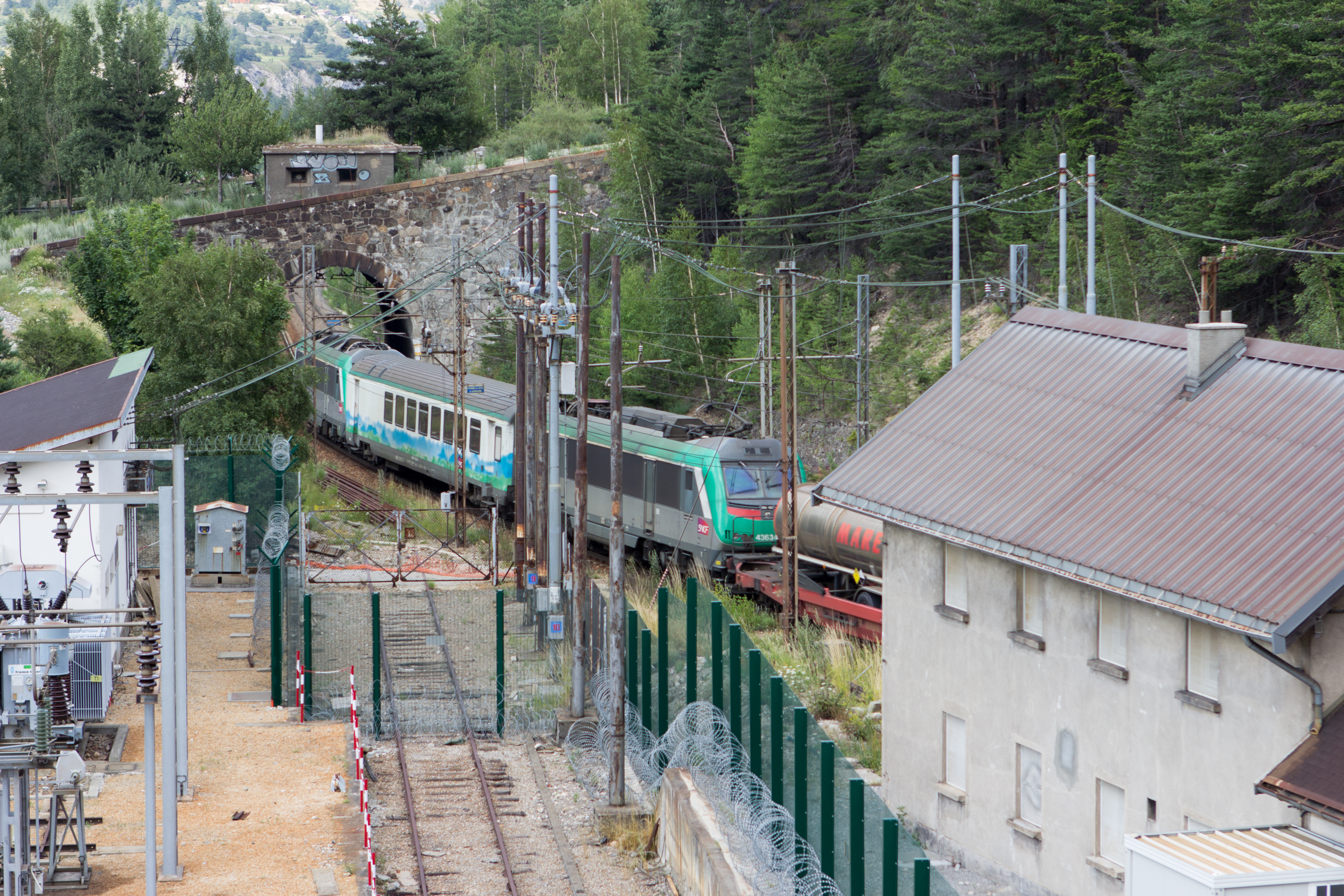 Entrée et accès au tunnel ferroviaire du Mont-Cenis, coté français - Modane, Savoie, France